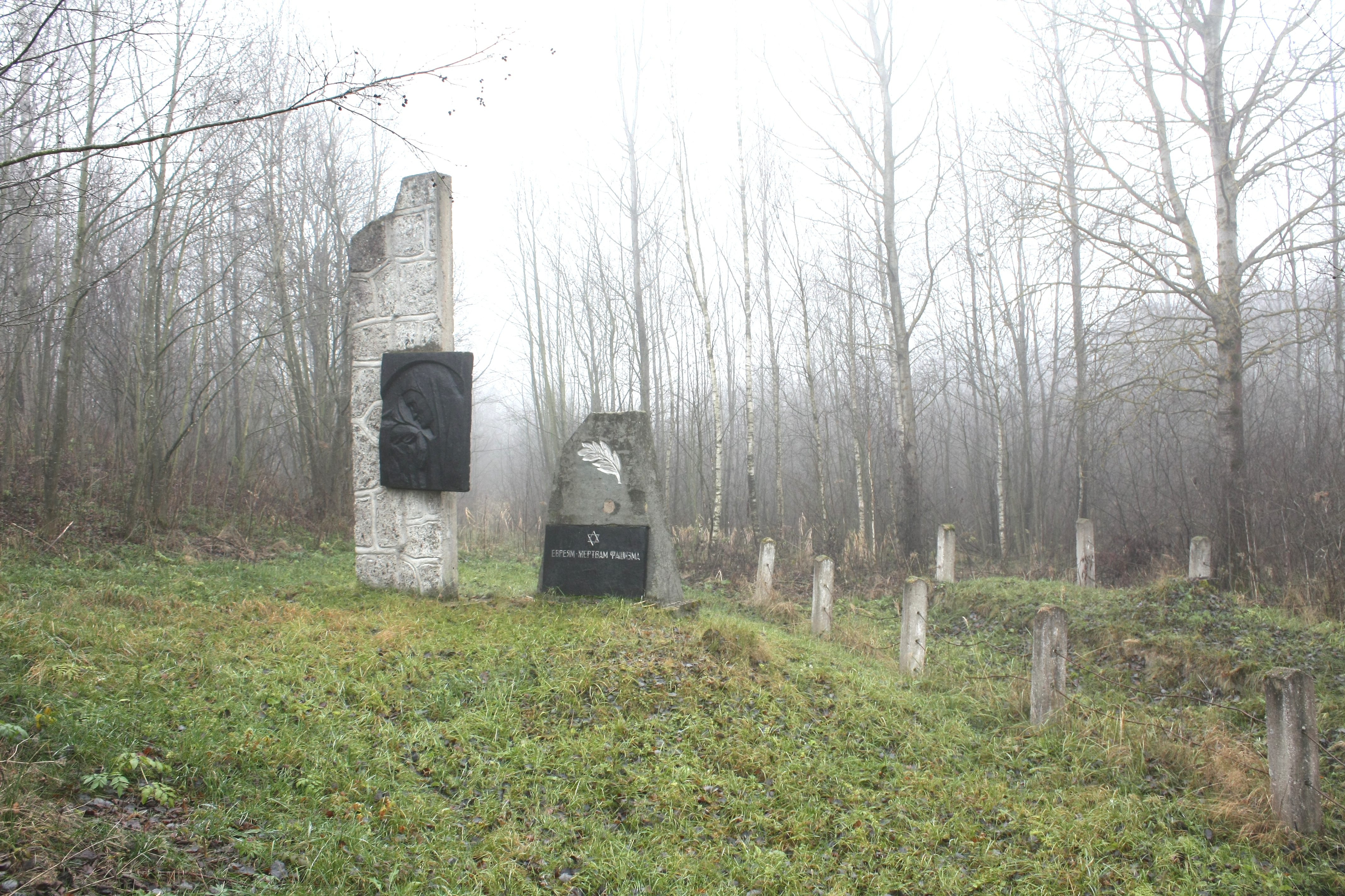 Памятник евреям - узникам гетто в Городке (Городокского района), убитым нацистами в Березовке.